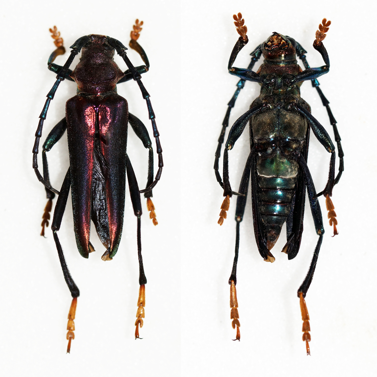 Chevrolat,1841 Sex: Male Data: 04-2012 - Sierra Madre - Aurora - Eastern Luzon - Philippines Size: ?